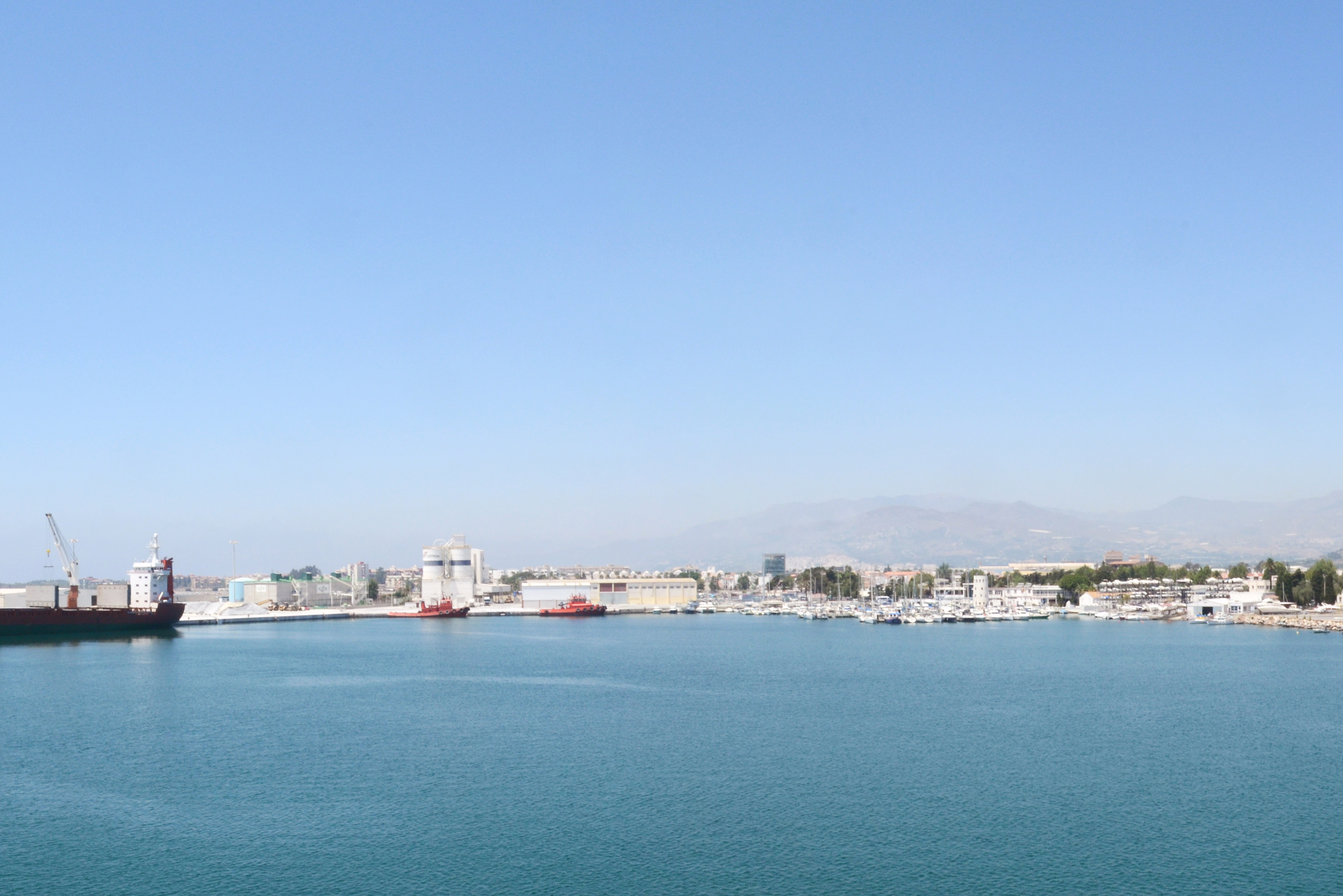 Detalle de la panorámica del Puerto de Motril